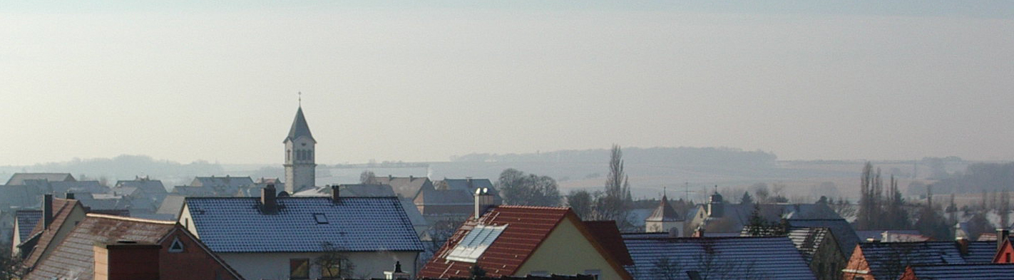 Blick über die Dächer von Rottenbauer mit den Türmen von St. Josef, Trinitatiskirche und Schloss.